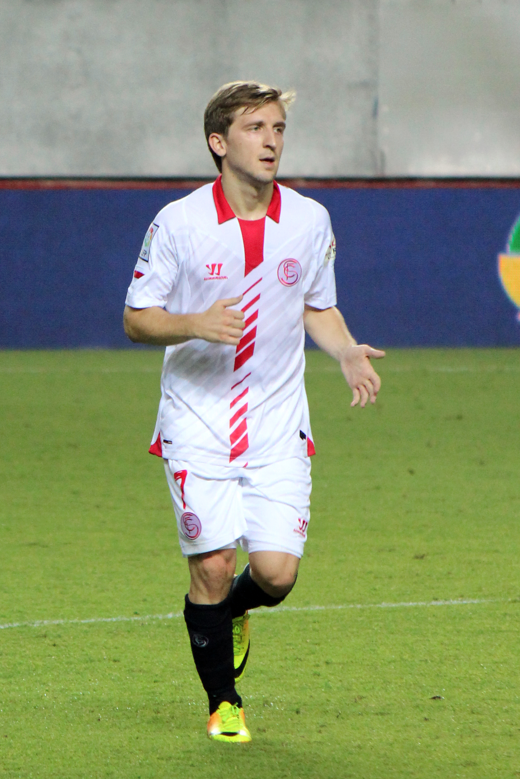 Futbolista del Sevilla FC cedido por el Chelsea FC